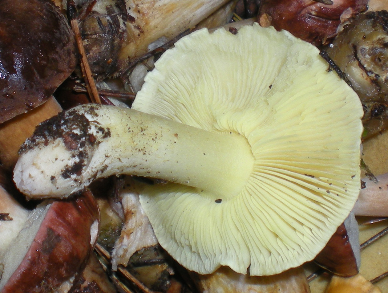 Gąska zielonka